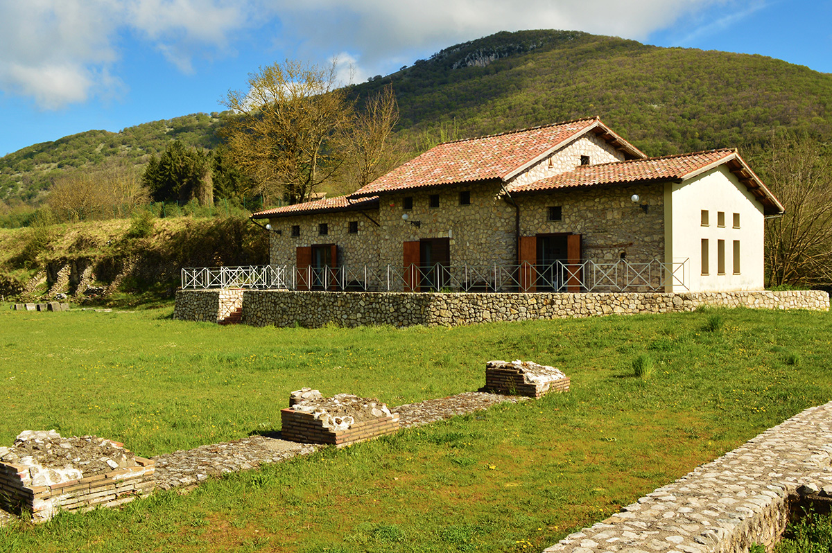 Museo Civico "Antiquarium"